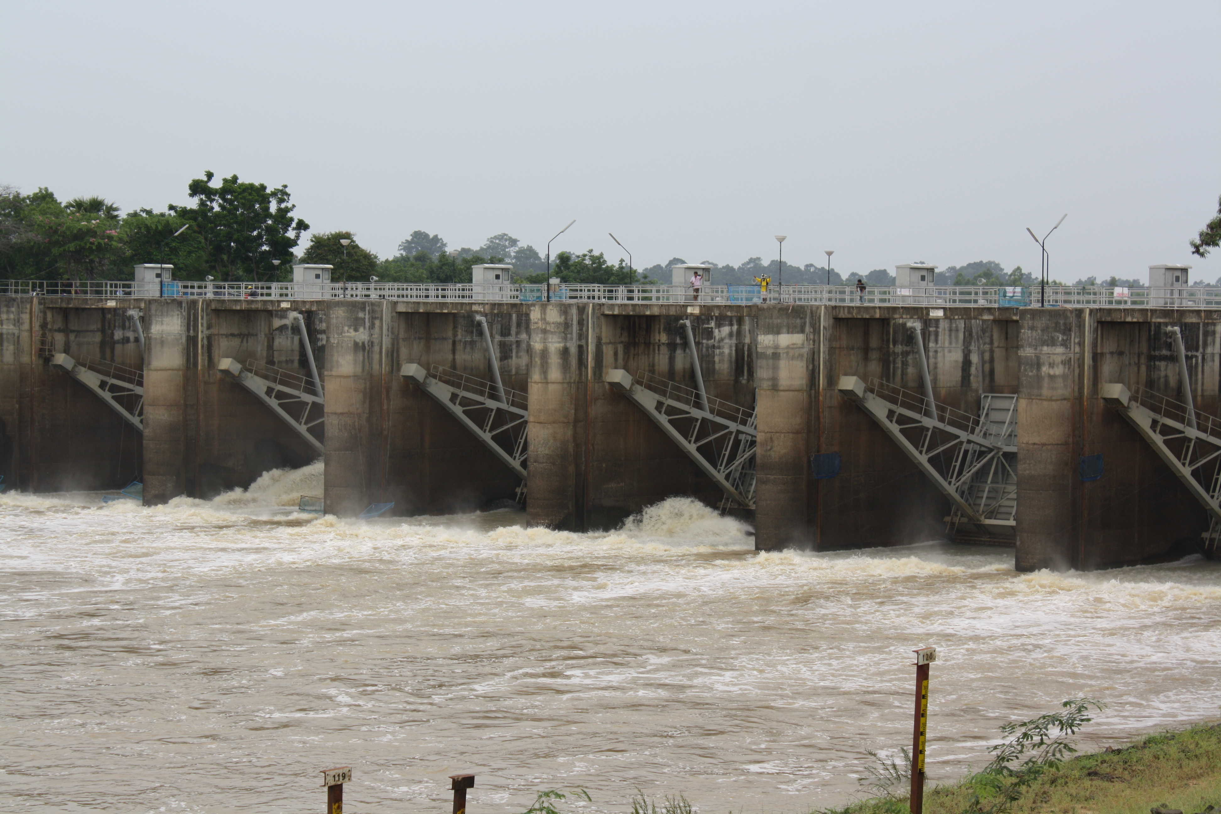 ภาพเขื่อนราษีไศล จังหวัดศรีสะเกษ